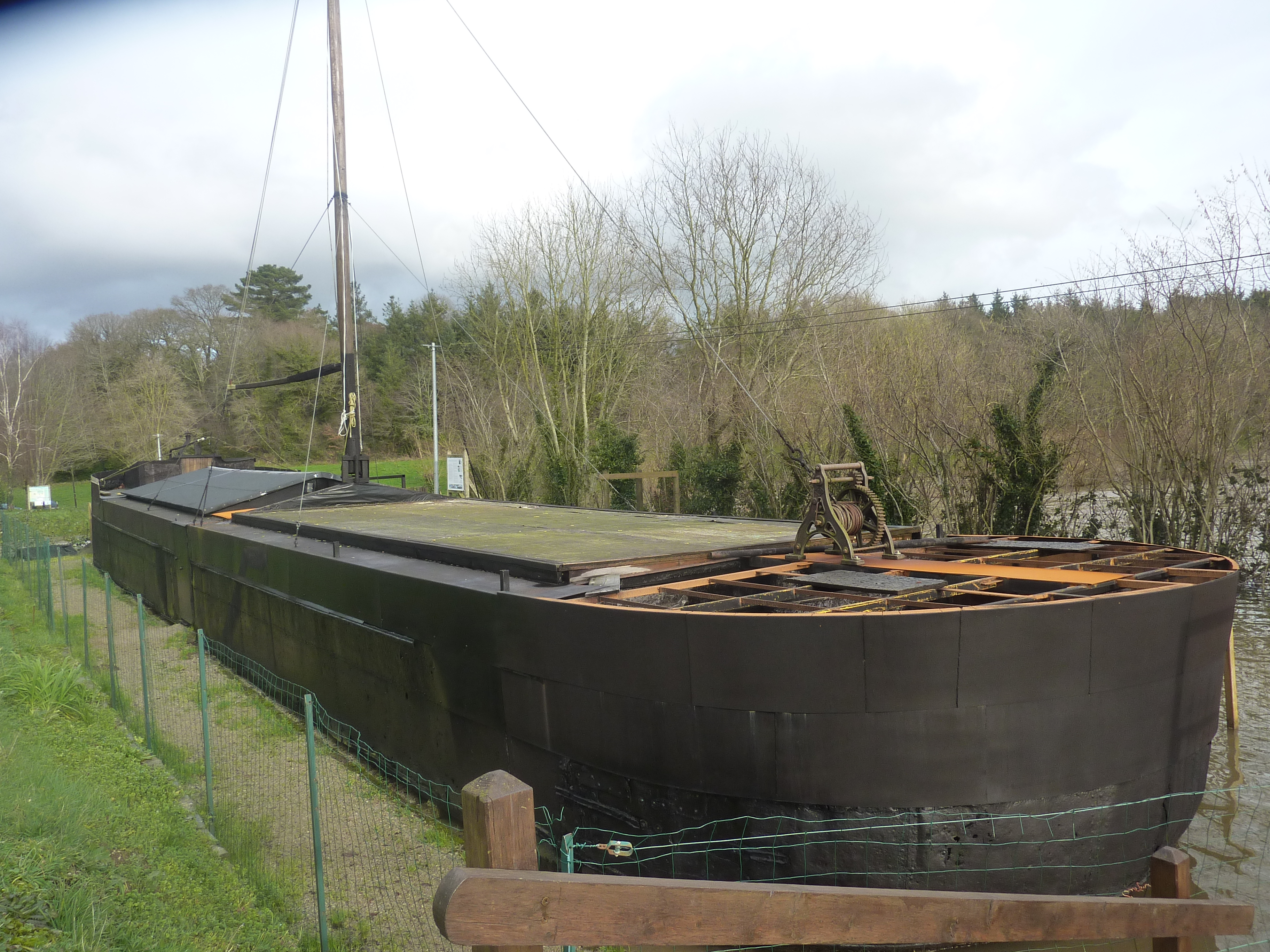 Le chaland Victor, construit en 1893, long de 26,8 m et large de 4,6 m, dernier vestige de la batellerie navigant sur le canal de Nantes à Brest. Appartenant à un propriétaire de Port-Launay, Il navigua jusqu'en 1932, transportant du maërl et des scories destinées à fertiliser les terres dans le sens montant, et des ardoises au retour dans le sens descendant. Le 2 décembre 1932, il heurta le pont de Ti-Men, à la limite des communes de Lennon, Gouézec et Pleyben et cessa de naviguer. A partir de 2003, il a été rénové par l'association "Il faut sauver Victor".